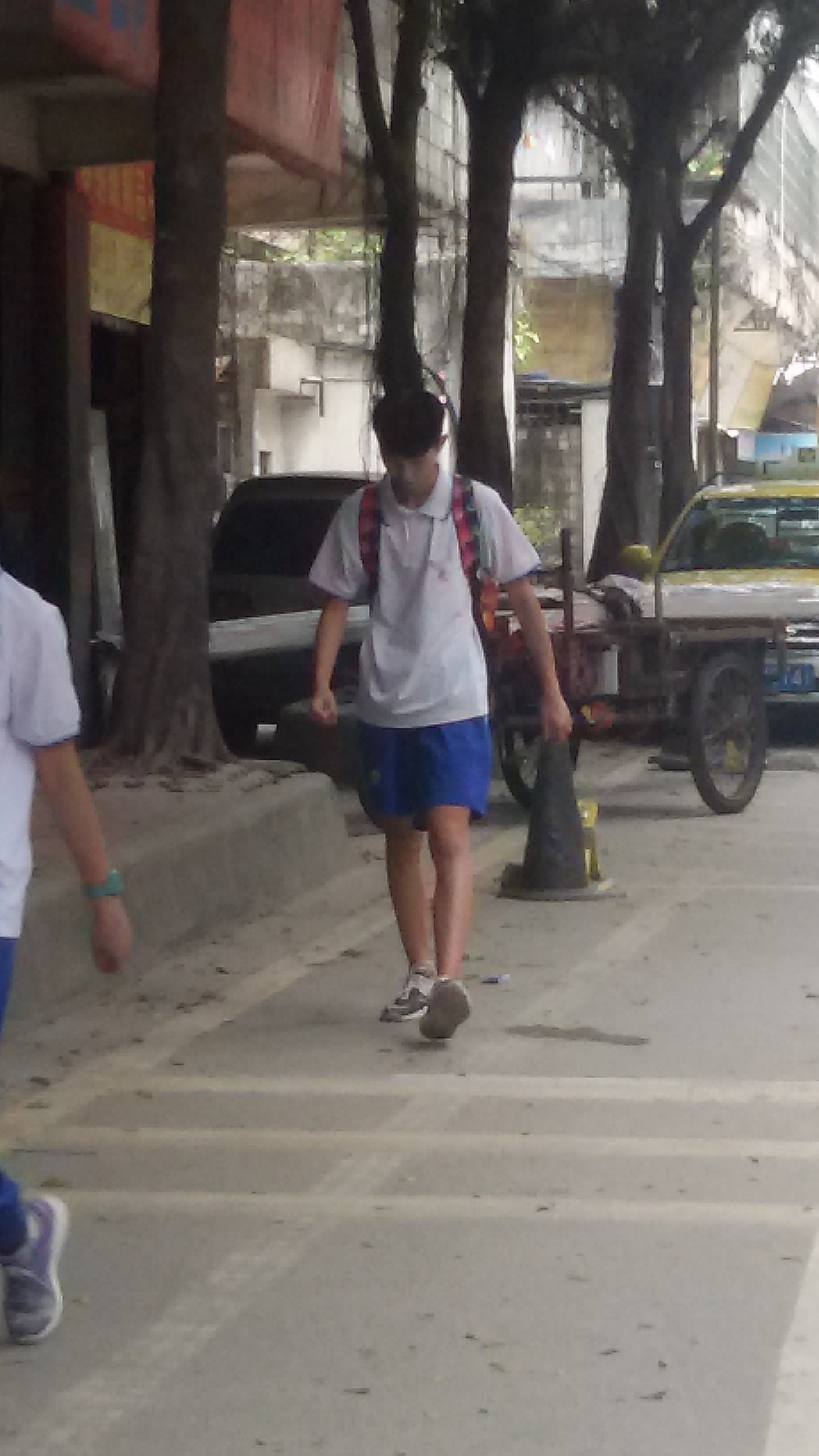 粵語: 广州市第98中学嘅短袖校服